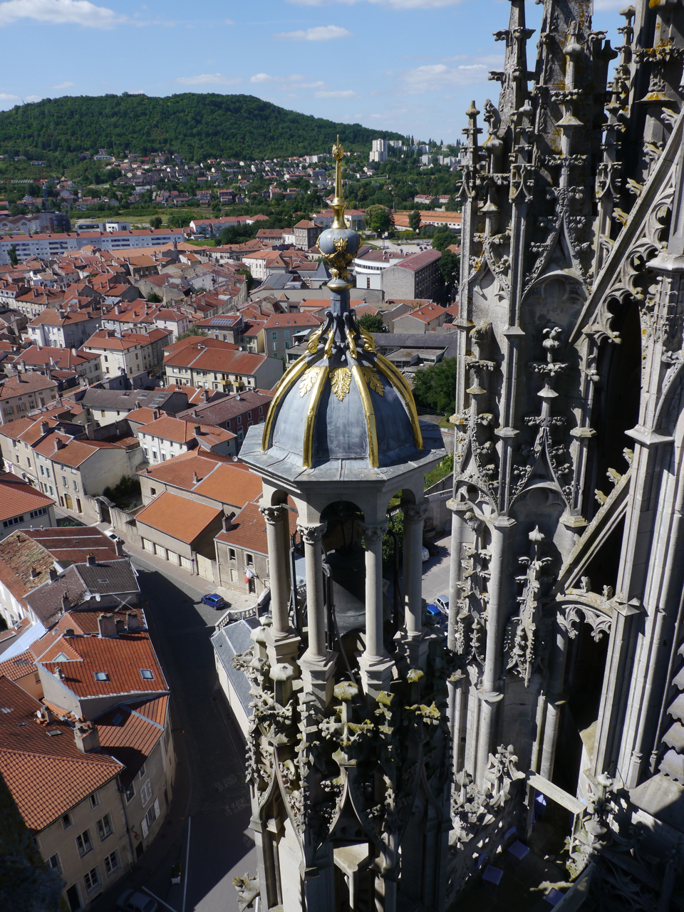 Clocheton Renaissance de la façade flamboyante de la Cathédrale de Toul vu depuis la Tour Sud-Ouest